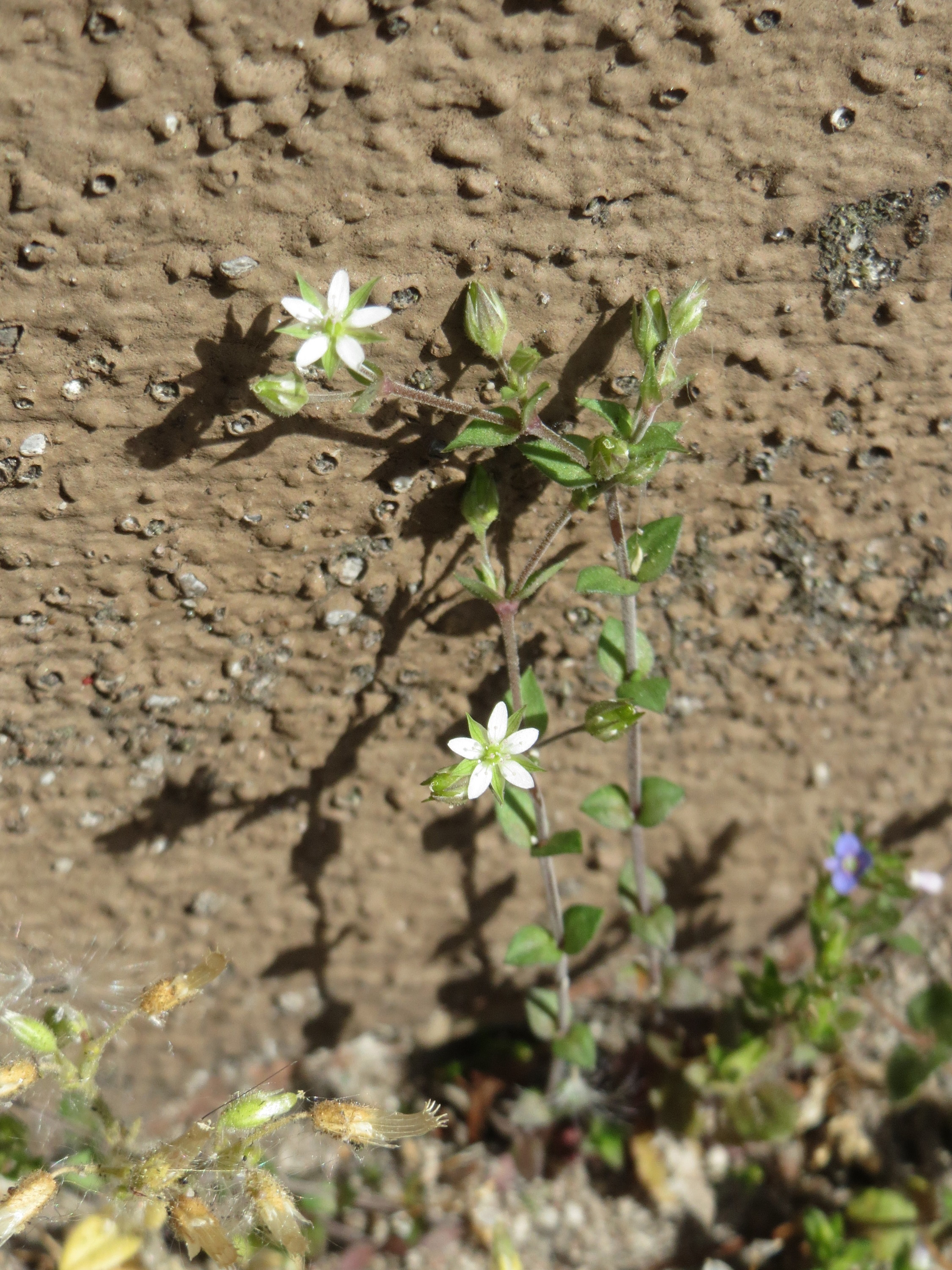 Ritzen-Botanik: Quendel-Sandkraut (Arenaria serpyllifolia) in Hockenheim